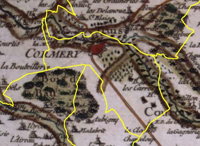 La commune de Cormery (limites en jaune) sur la carte de Cassini